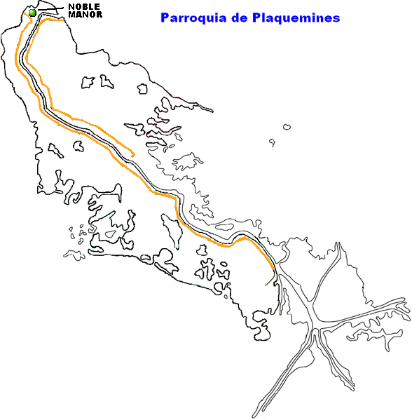 Noble Manor, Louisiana